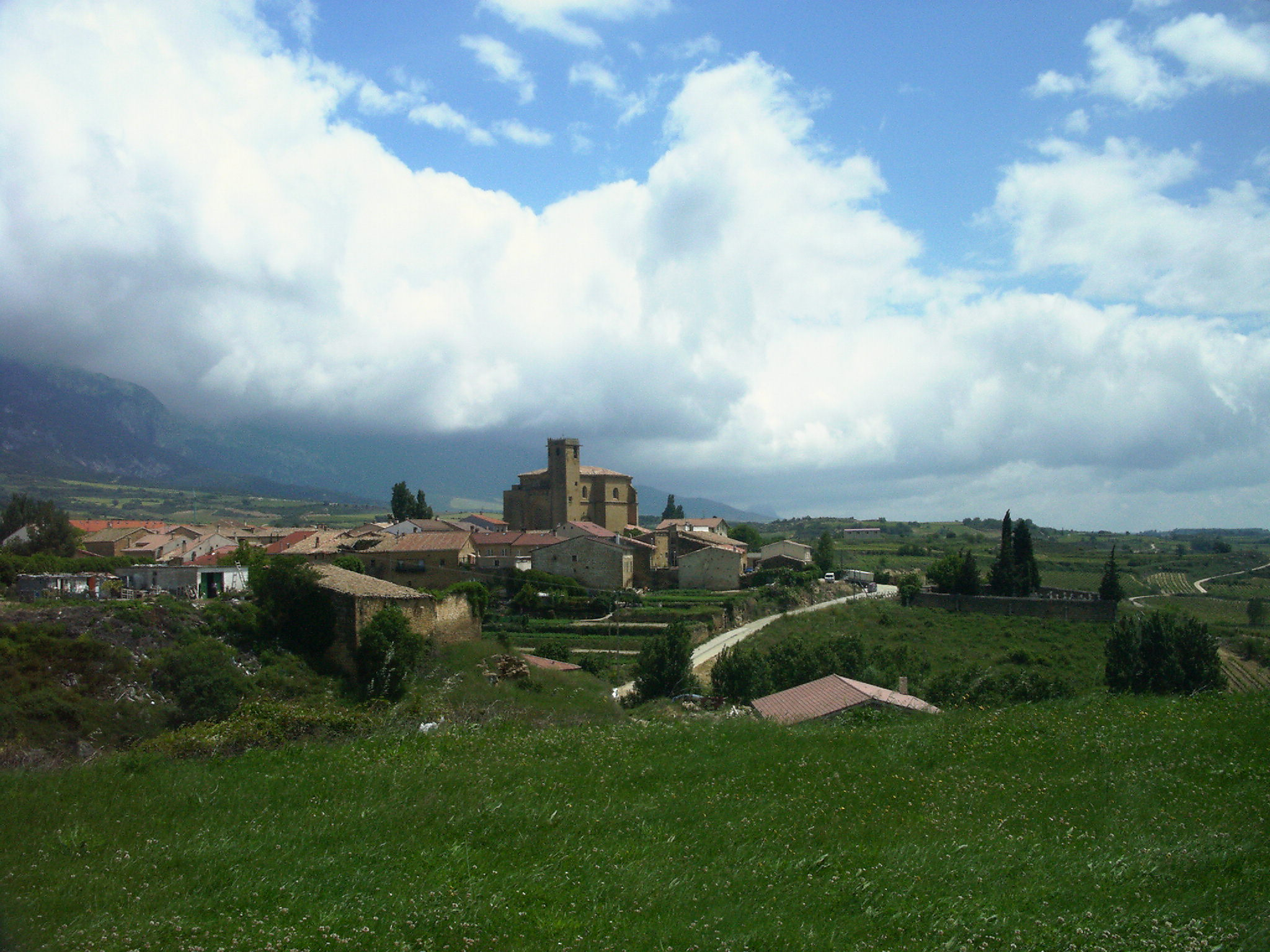 Samaniegoko ikuspegia